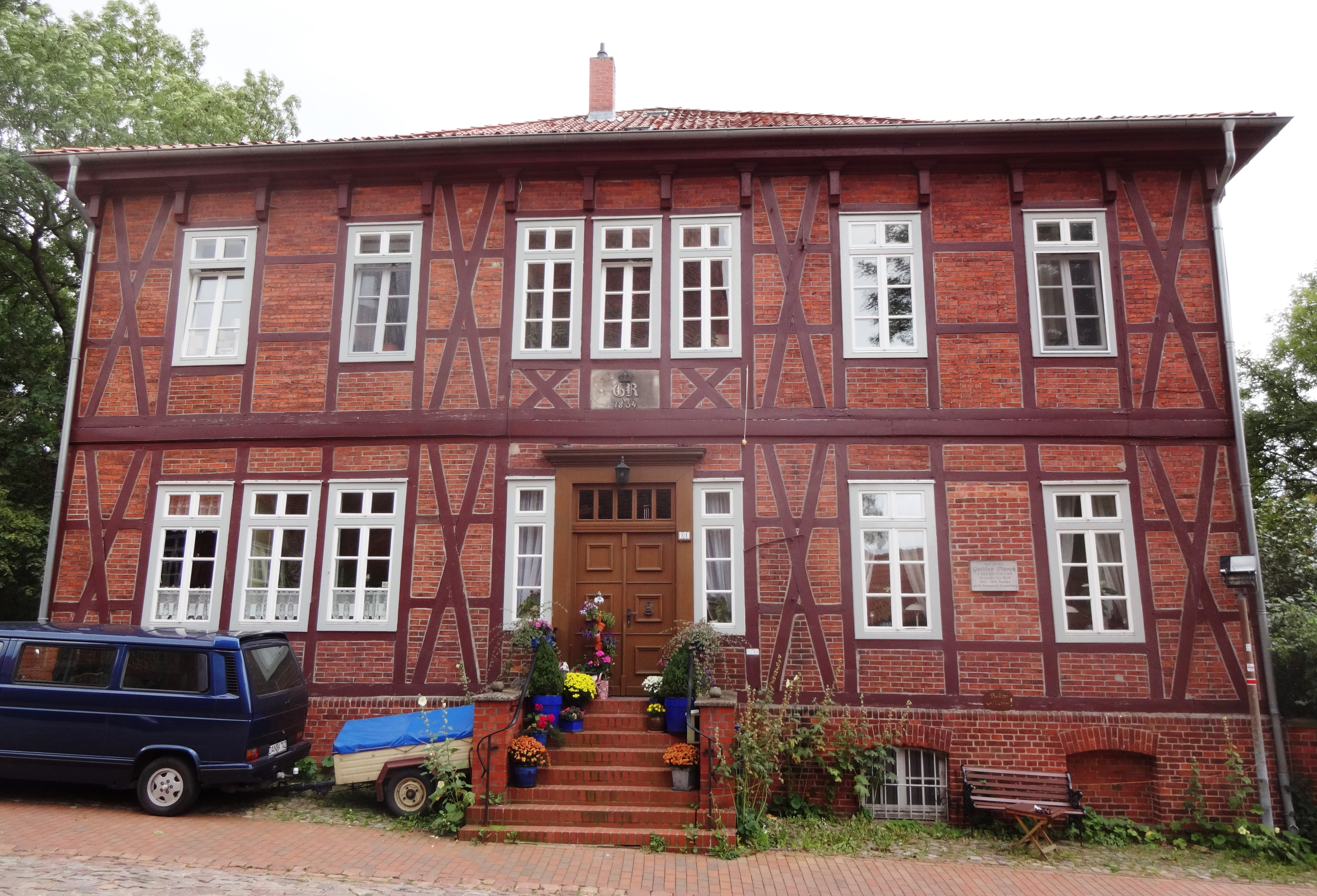 kleines Obergericht in Dannenberg, an dem Gottlieb Planck 1855-59 als Richter tätig war